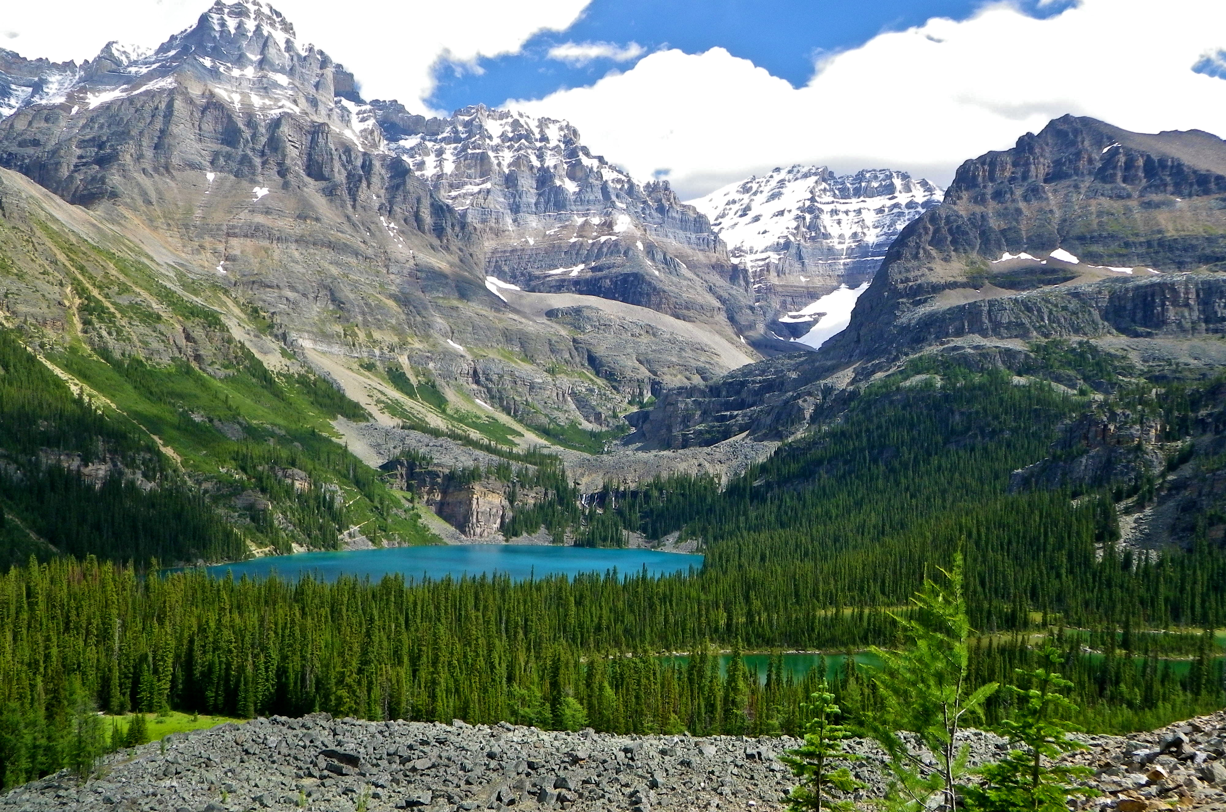 Lake O'Hara